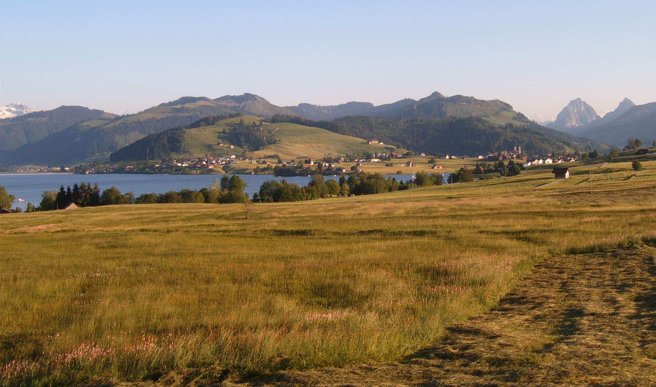 Sihlsee, Canton of Schwyz (Switzerland): northern shore with Friherrenberg, Einsiedeln Abbey and Mythen